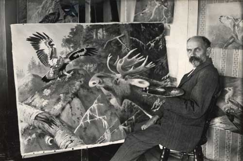 Taiteilija Matti Karppanen viimeistelemässä maalaustaan "Hirvi ja maakotka"